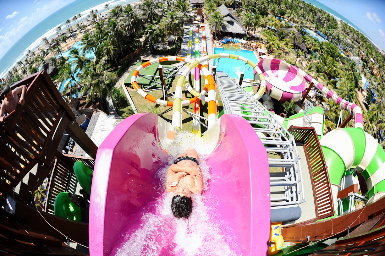 A mais nova atração do parque aquático do Beach Park.